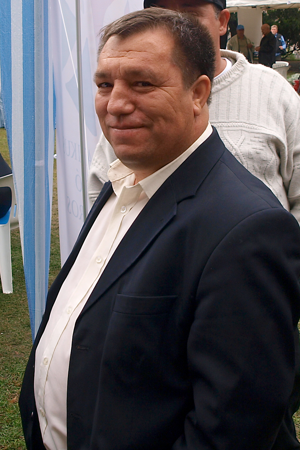 Kolompár Orbán